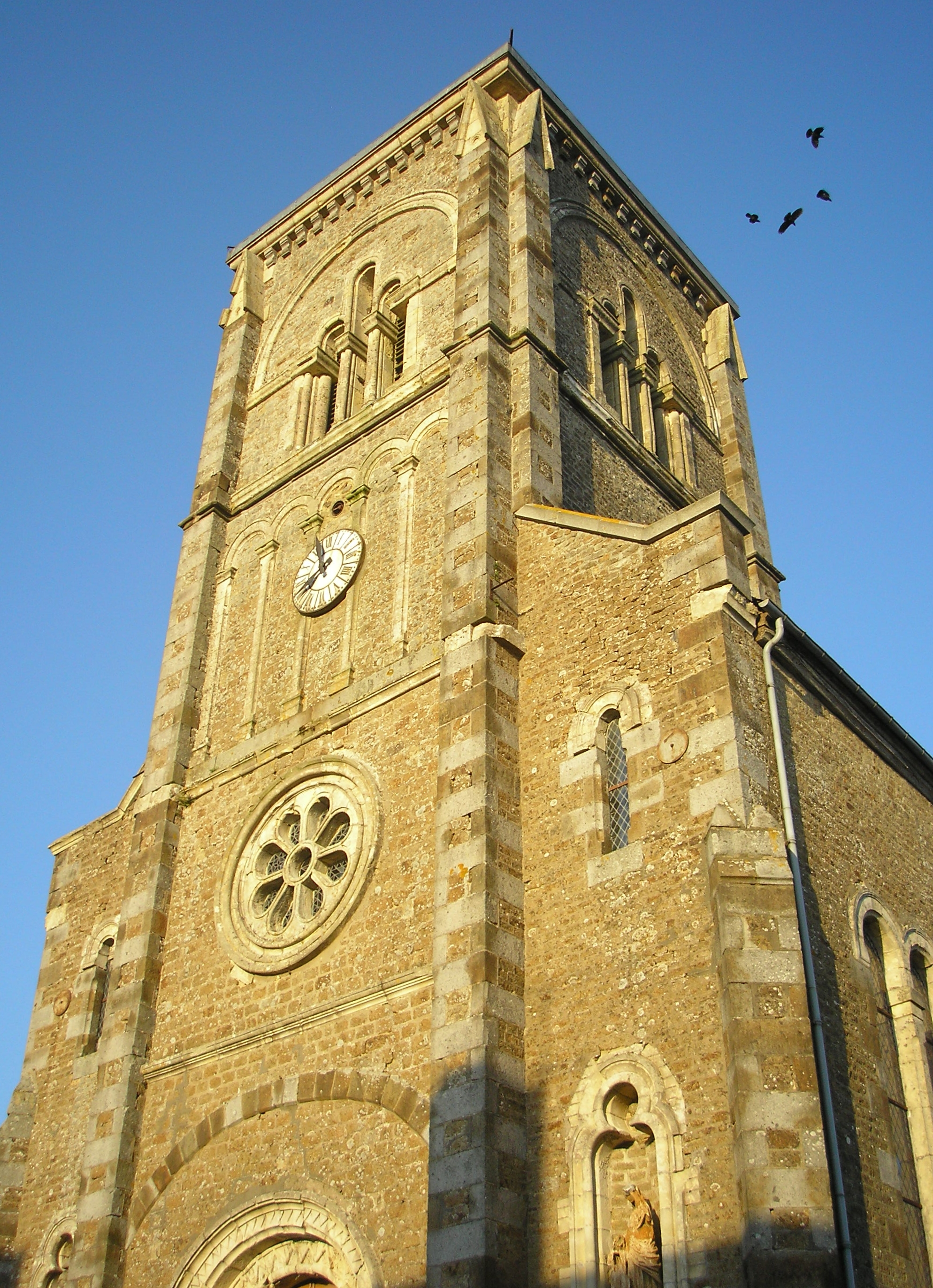 Saint-Cornier-des-Landes (Normandie, France). Le clocher de l'église.